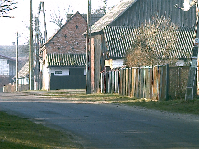 Wodnica, wieś